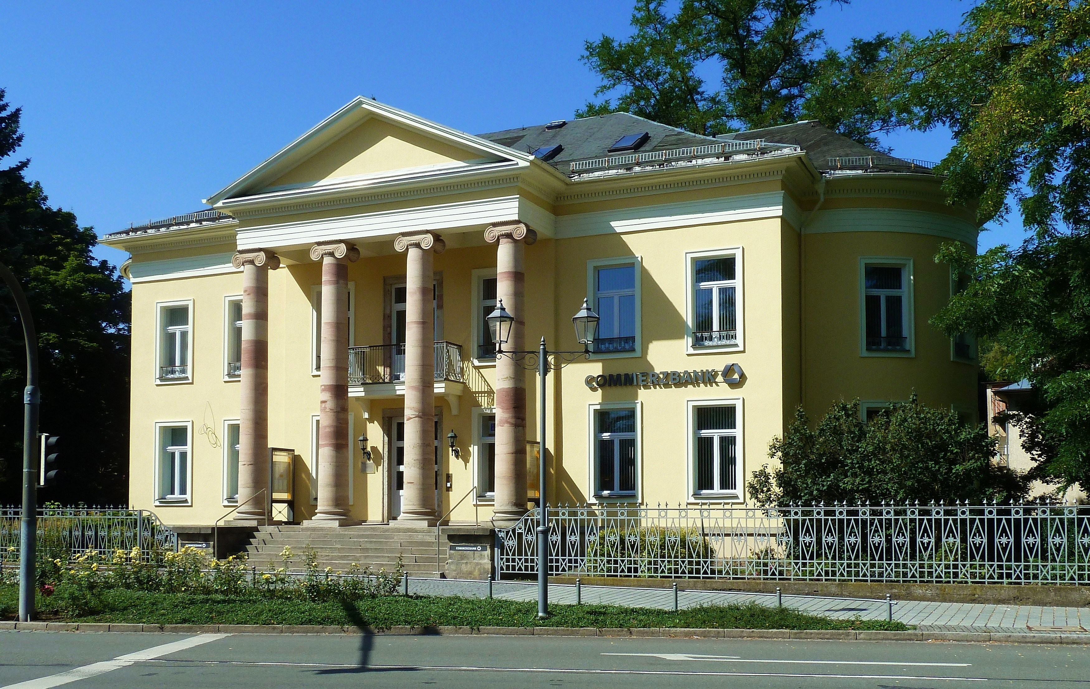 Kleines Palais in Meiningen, ein Palast der Herzöge von Sachsen-Meiningen, erbaut 1823.